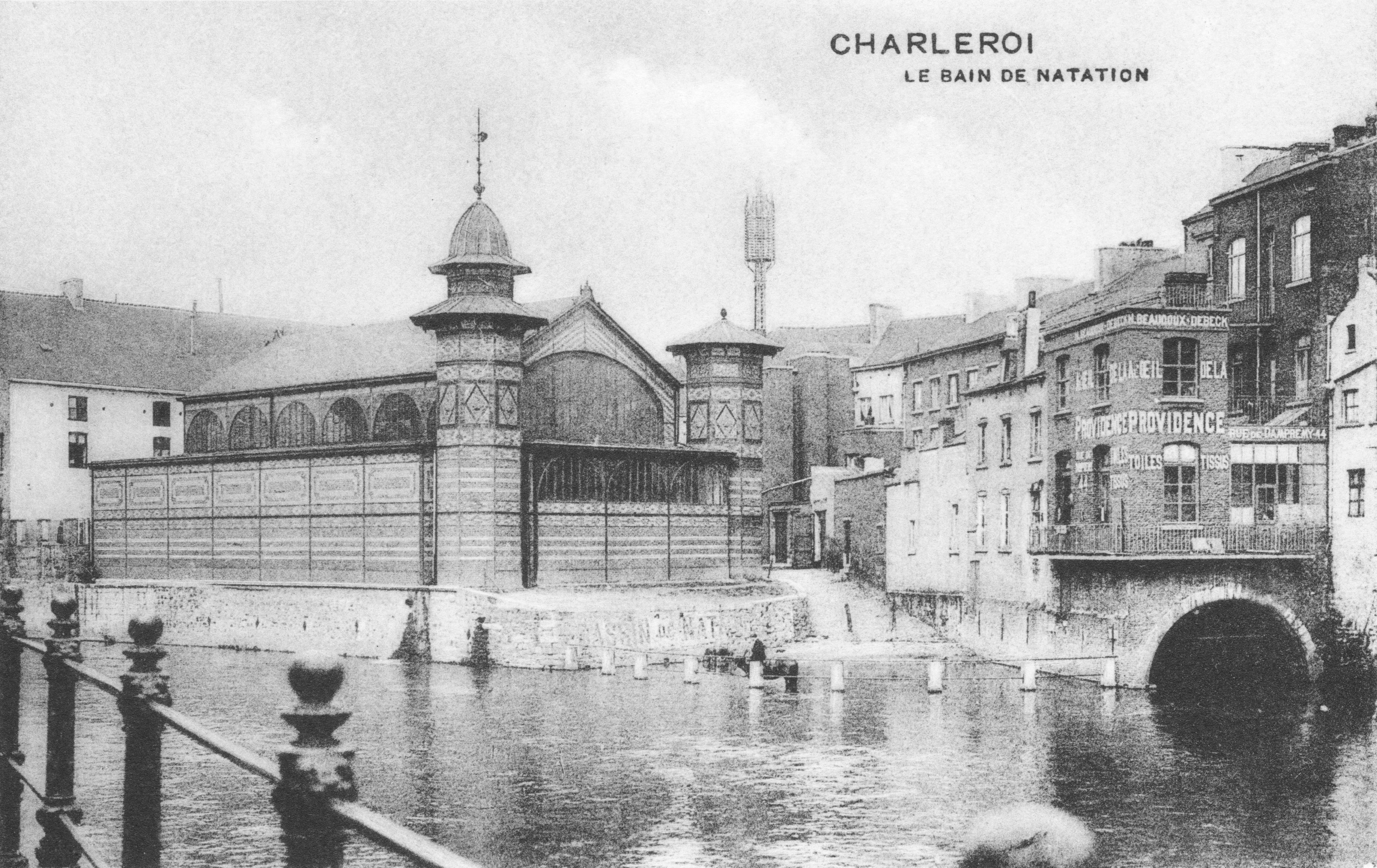 Charleroi (Belgique) - La Sambre, l'embouchure du Piéton et le bassin de natation. Carte postale Nels publiée vers 1920.